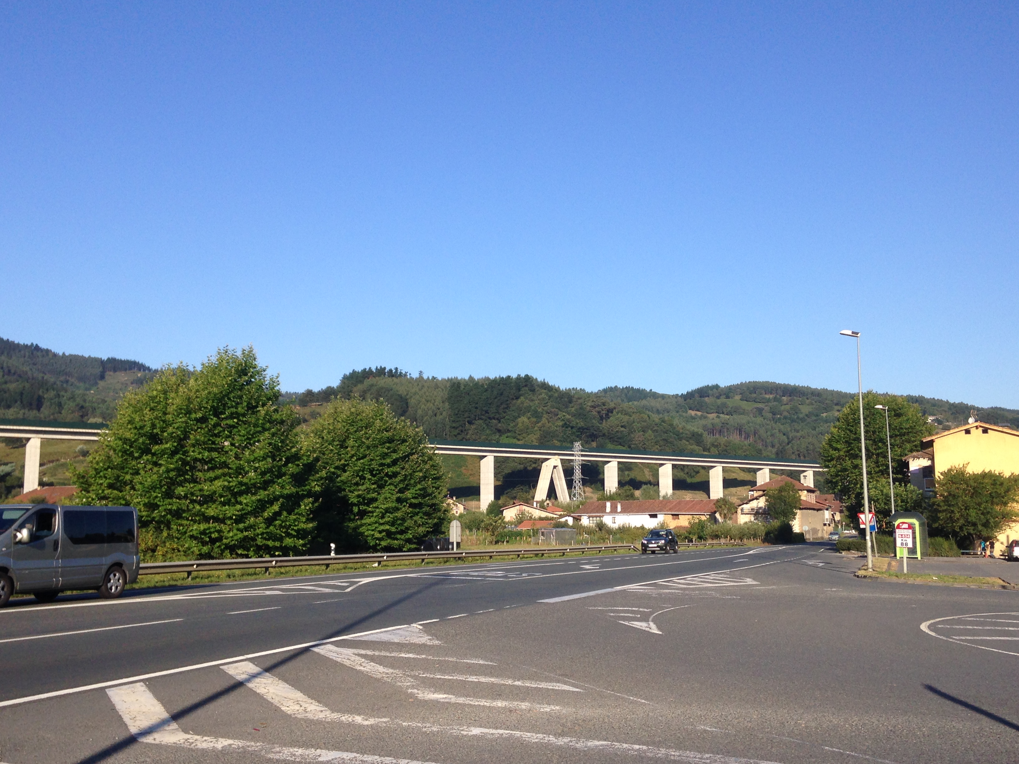 Viaducto de San Antonio-Malaespera en Amorebieta, Bizkaia, País Vasco (España) del Tren de Alta velocidad. Es el viaducto más largo del tramo con 837 m de longitud y se caracteriza por su pila central, en forma de delta. Su tipología es de doble viga artesa de 2,6 m y el sistema de construcción mediante tablero prefabricado. Luces: 30+20×39+36